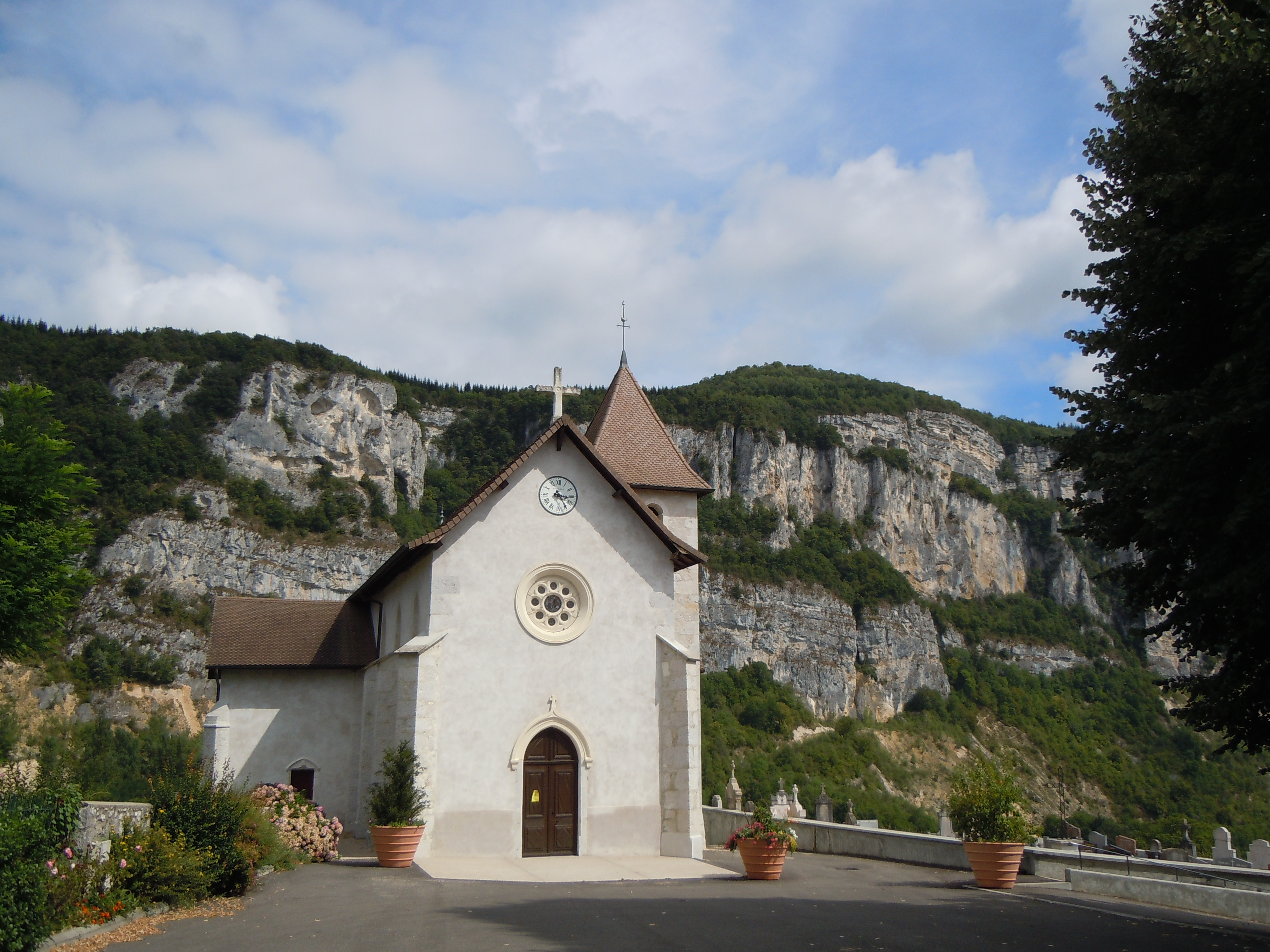 Eglise de Rochefort (Savoie)